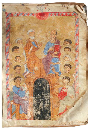 ლარგვისის ოთხთავი